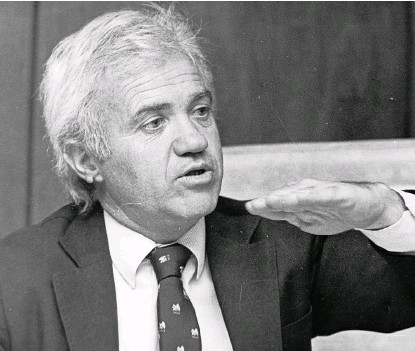 Rodolfo O'Reilly (1939-2018), ex dirigente deportivo argentino. En el dominio público por caducidad de los derechos de autor en Argentina, Ley 11723, artículo 34.